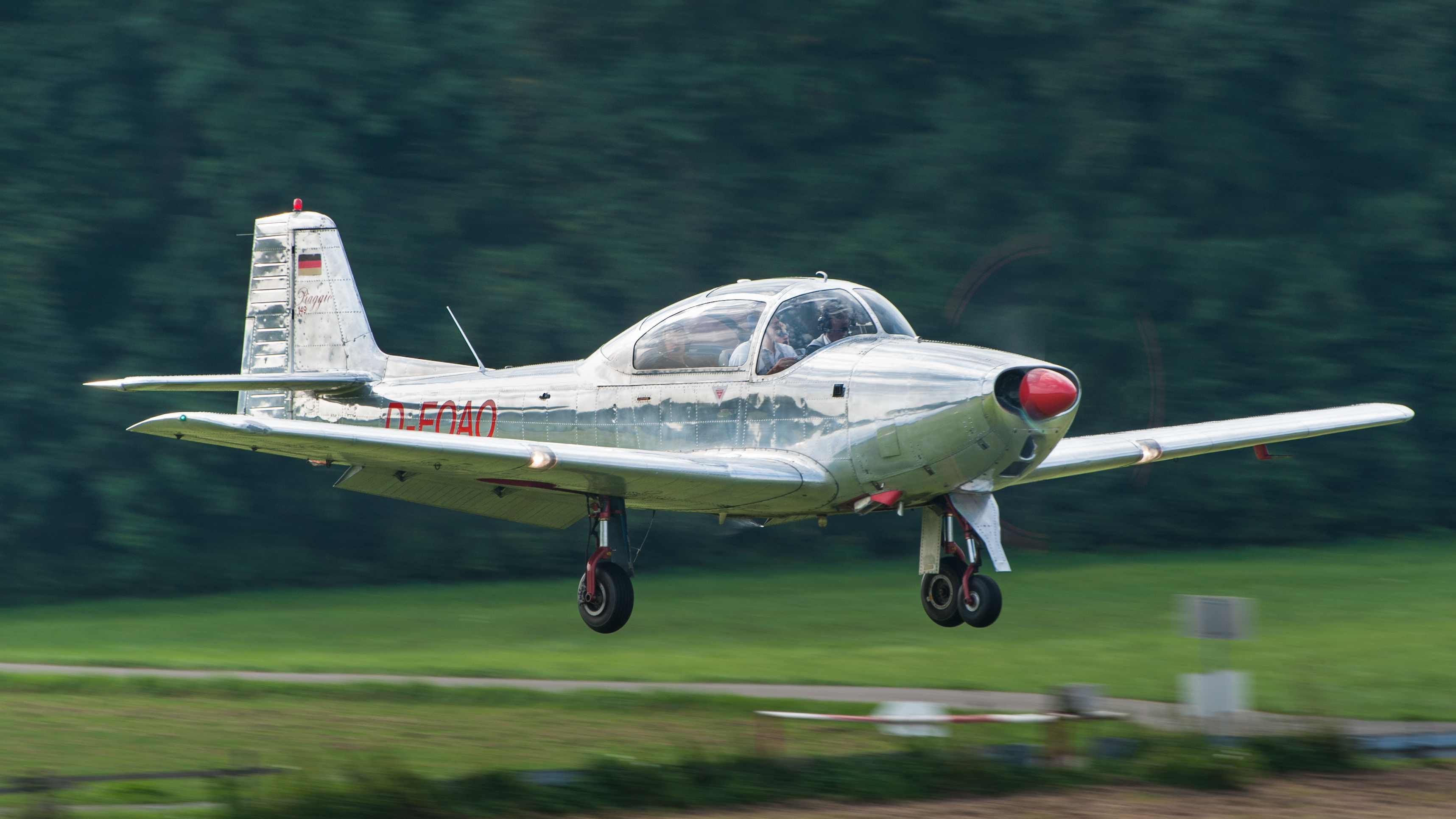 Dieses Foto wurde beim Oldtimer Fliegertreffen, 2013 am Flugfeld Hahnweide bei Kirchheim unter Teck aufgenommen. Es zeigt eine Piaggio P-149D bei der Landung